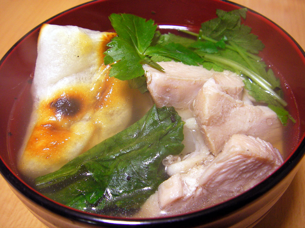 Zoni / Ozoni